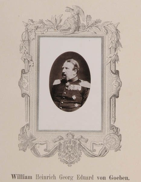 William Heinrich Georg Eduard von Goeben (* 30. Juli 1818 in Stade; † 19. April 1902 in Lauenstein (Kreis Hameln)) war königlich preußischer General der Infanterie und zuletzt Kommandant der Festung Mainz.